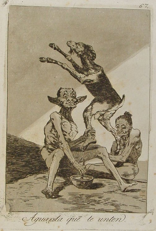 Capricho nº 67: Aguarda que te unten de Goya, serie Los Caprichos